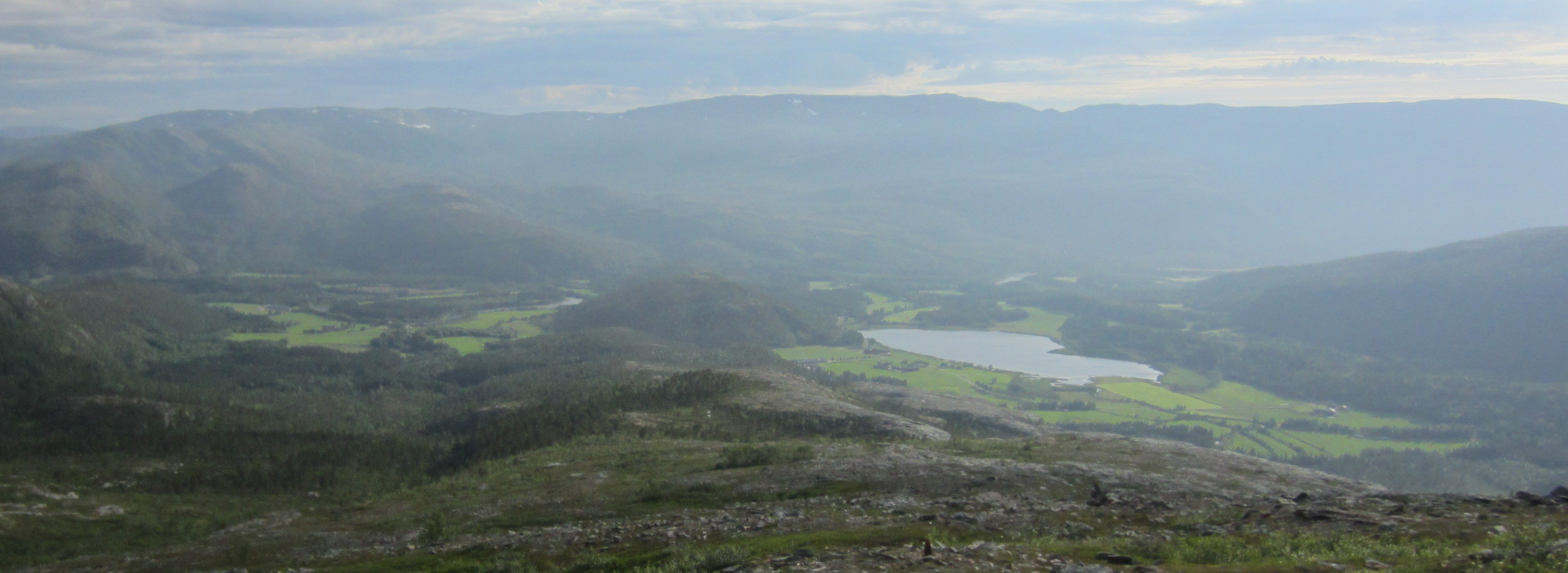 Fotografi av Åbygda, som er en bygd i Bindal kommune i Nordland, Norge. Tatt fra Skarstadfjellet.